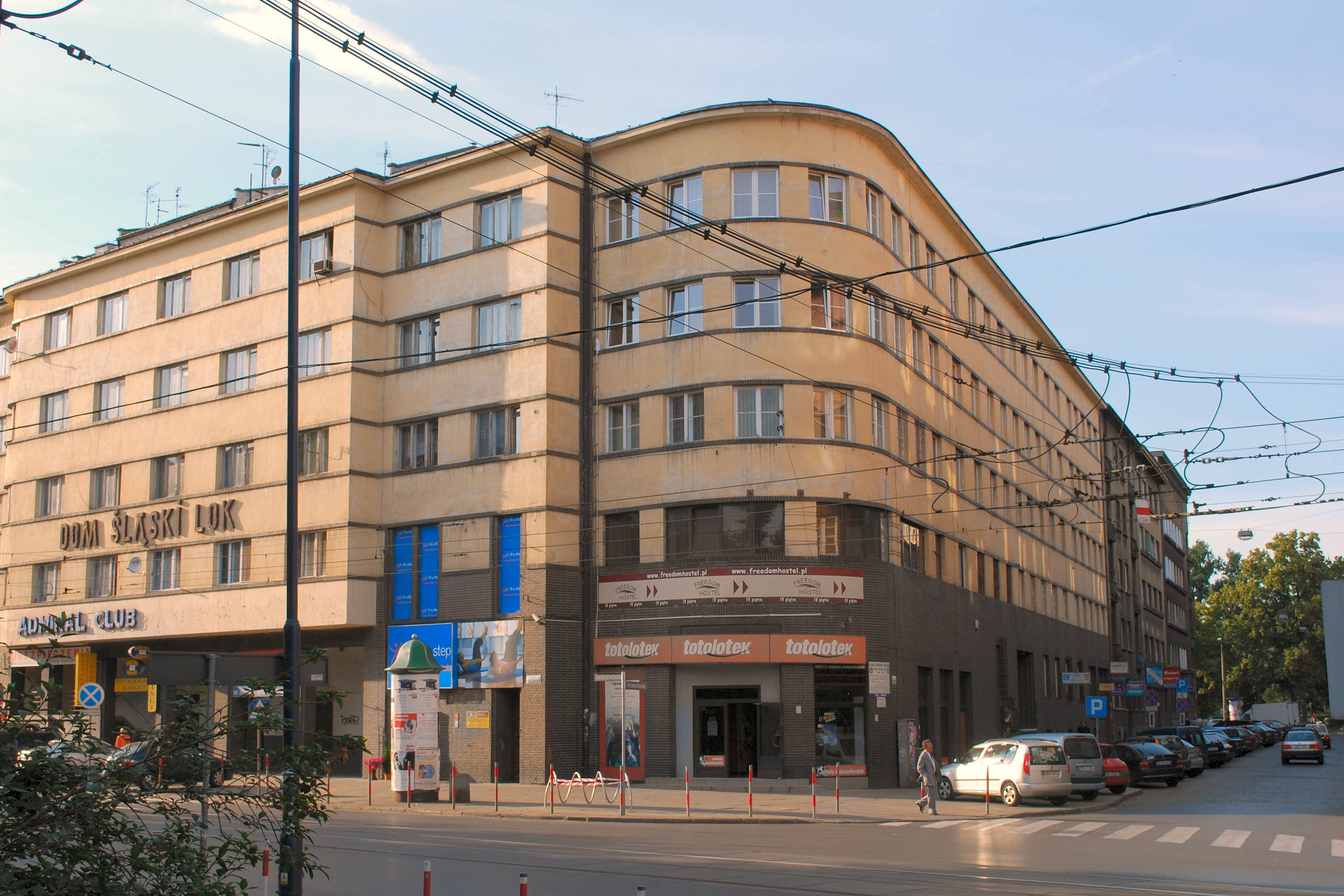 Dom Śląski - oddział Muzeum Historycznego Miasta Krakowa, była katownia Gestapo